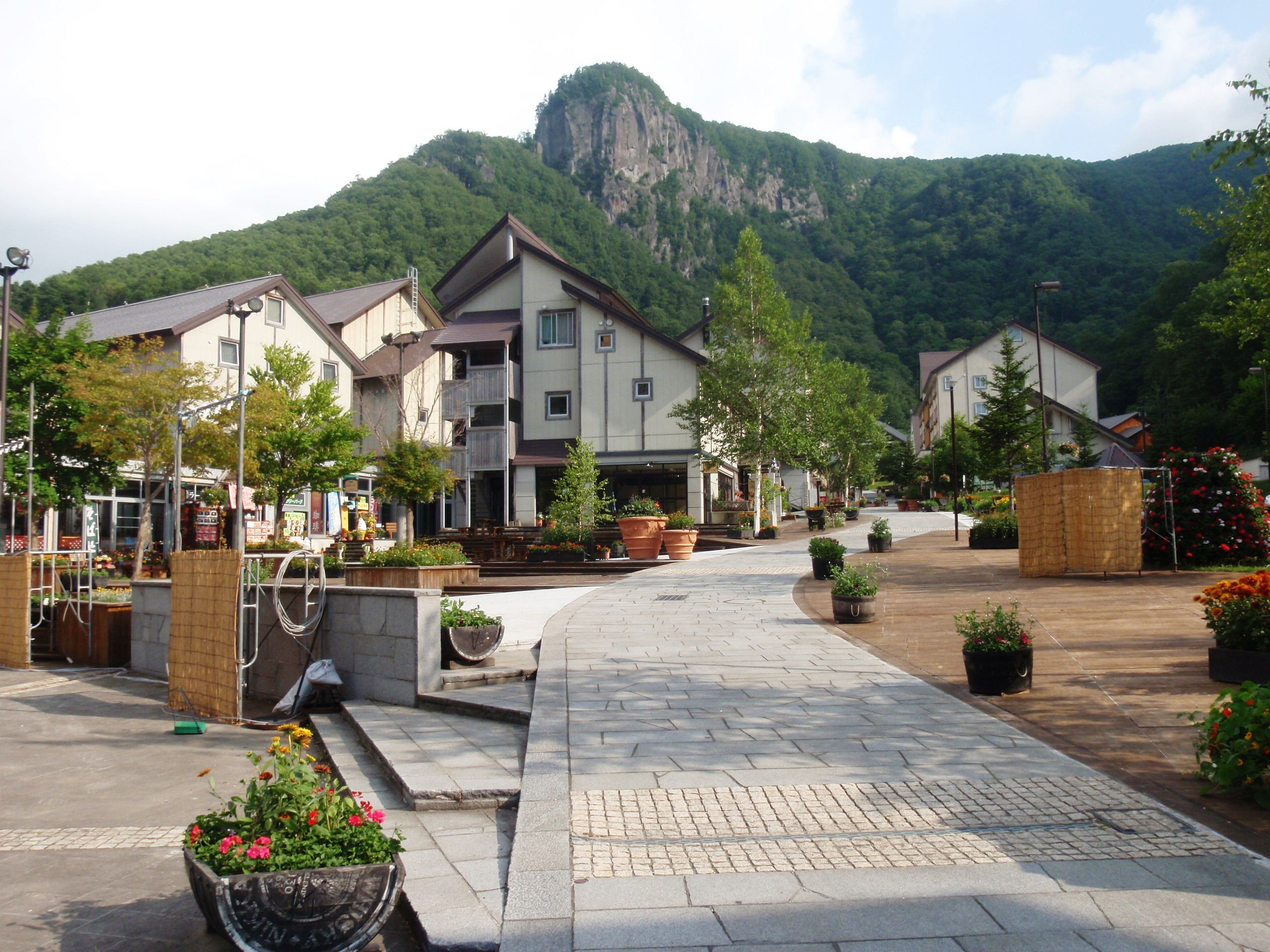 層雲峡温泉街プロムナード